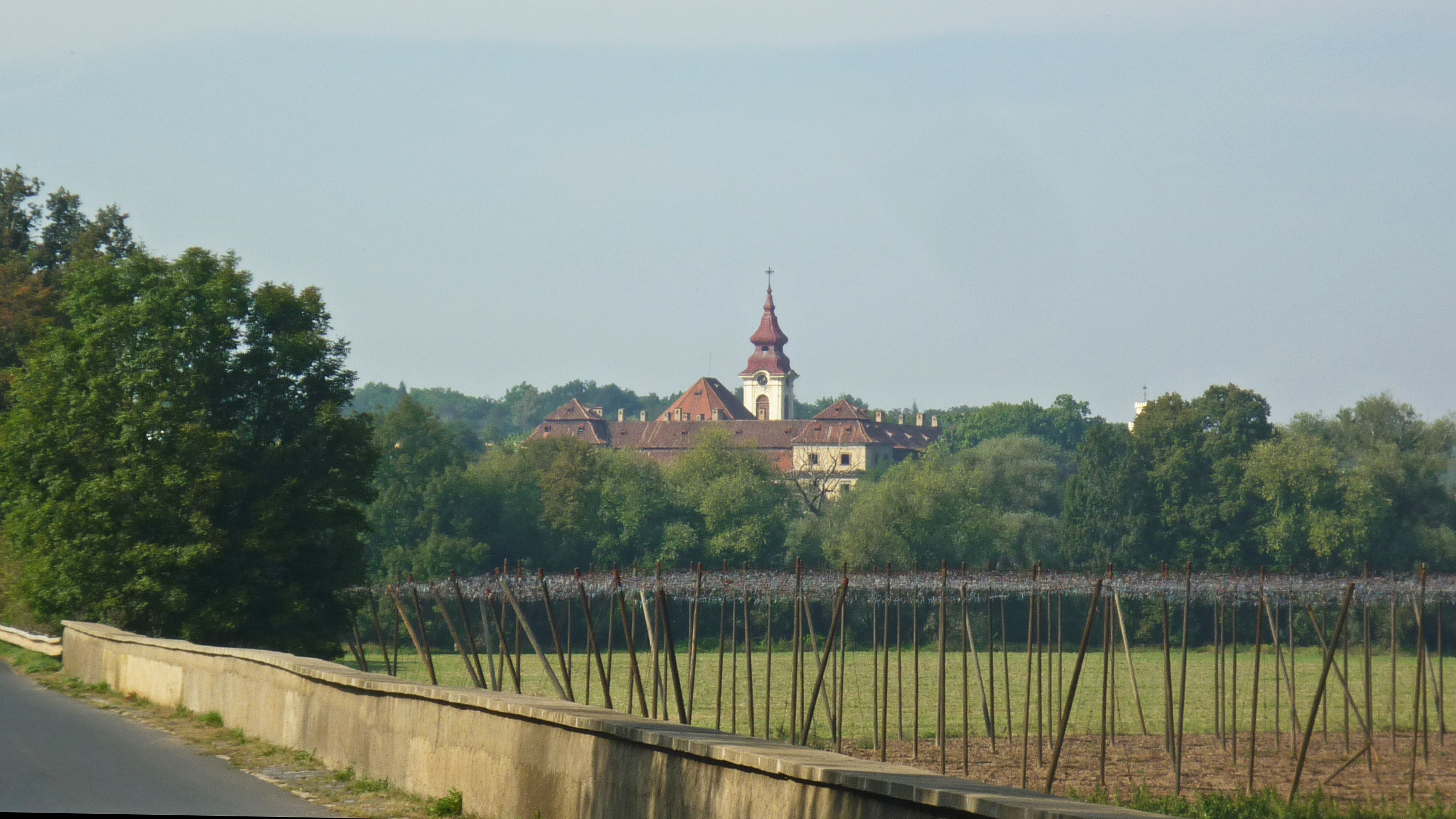 Blick auf Postelberg (Postoloprty)